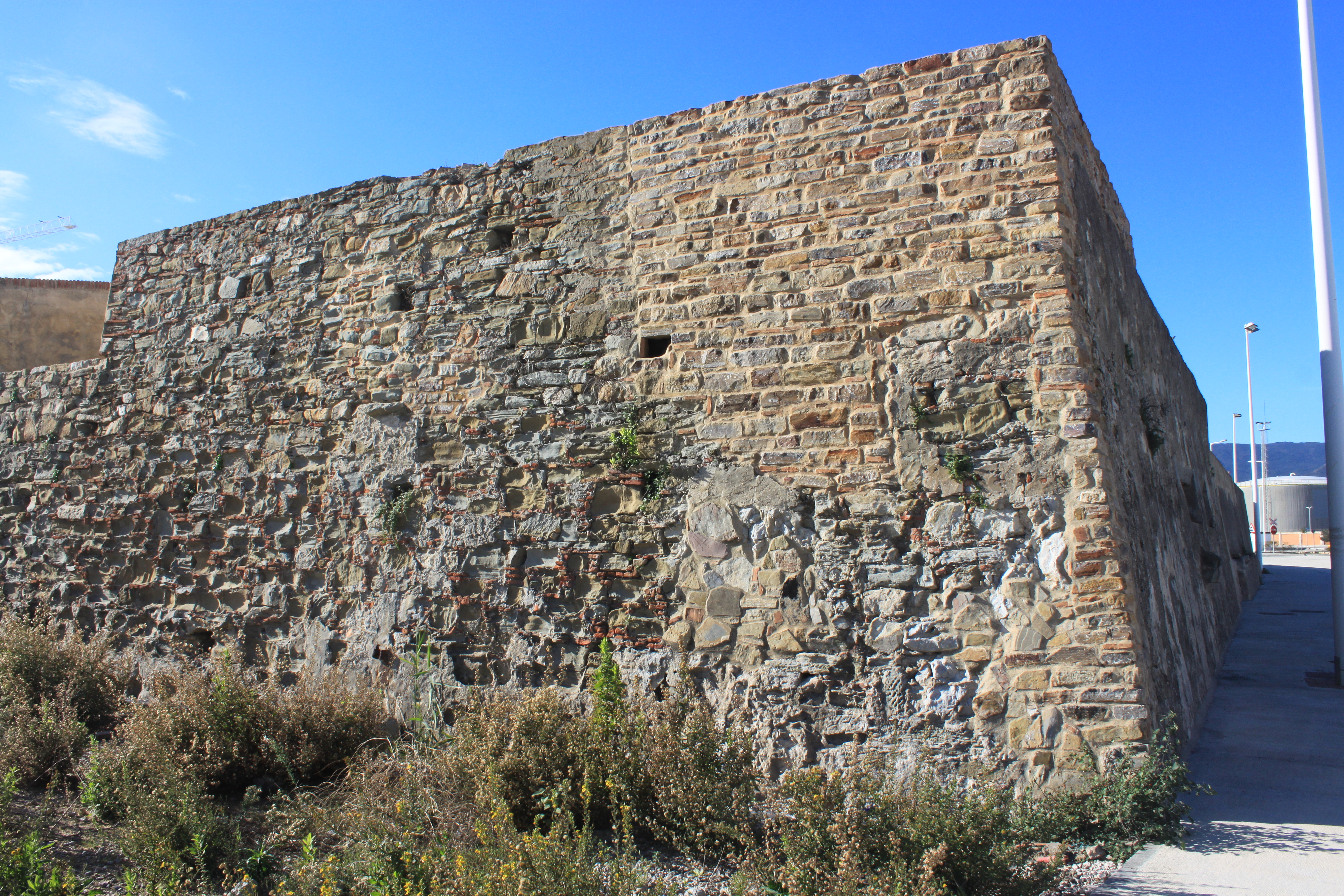 Restos del Fuerte de Isla Verde, en el interior de las instalaciones del Puerto de Algeciras. Algeciras, Andalucía, España.